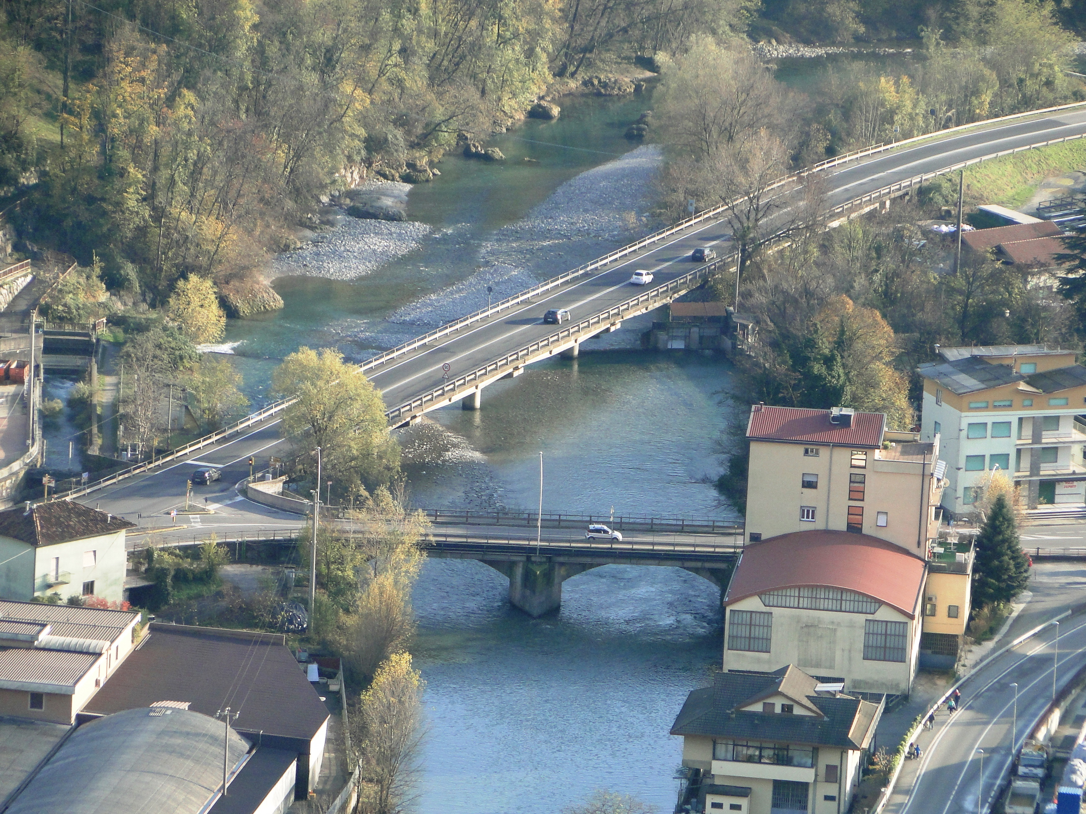 Colzate (BG). Ponte sul fiume Serio all'ingresso del paese, con SS 671